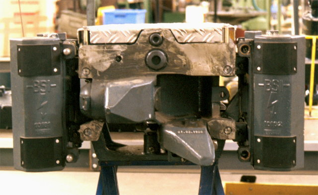 BSI koppeling sneltram Utrecht tijdens opendag werkplaasts Haarlem in 2002